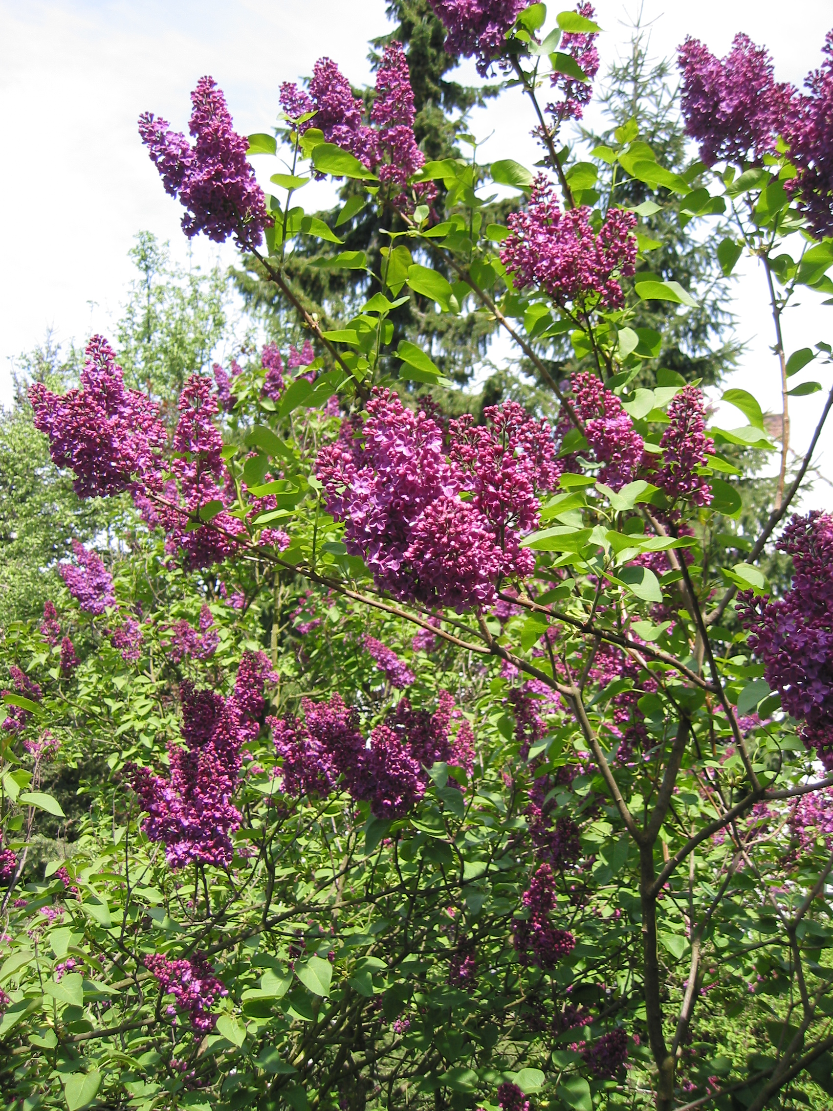 Lilac.